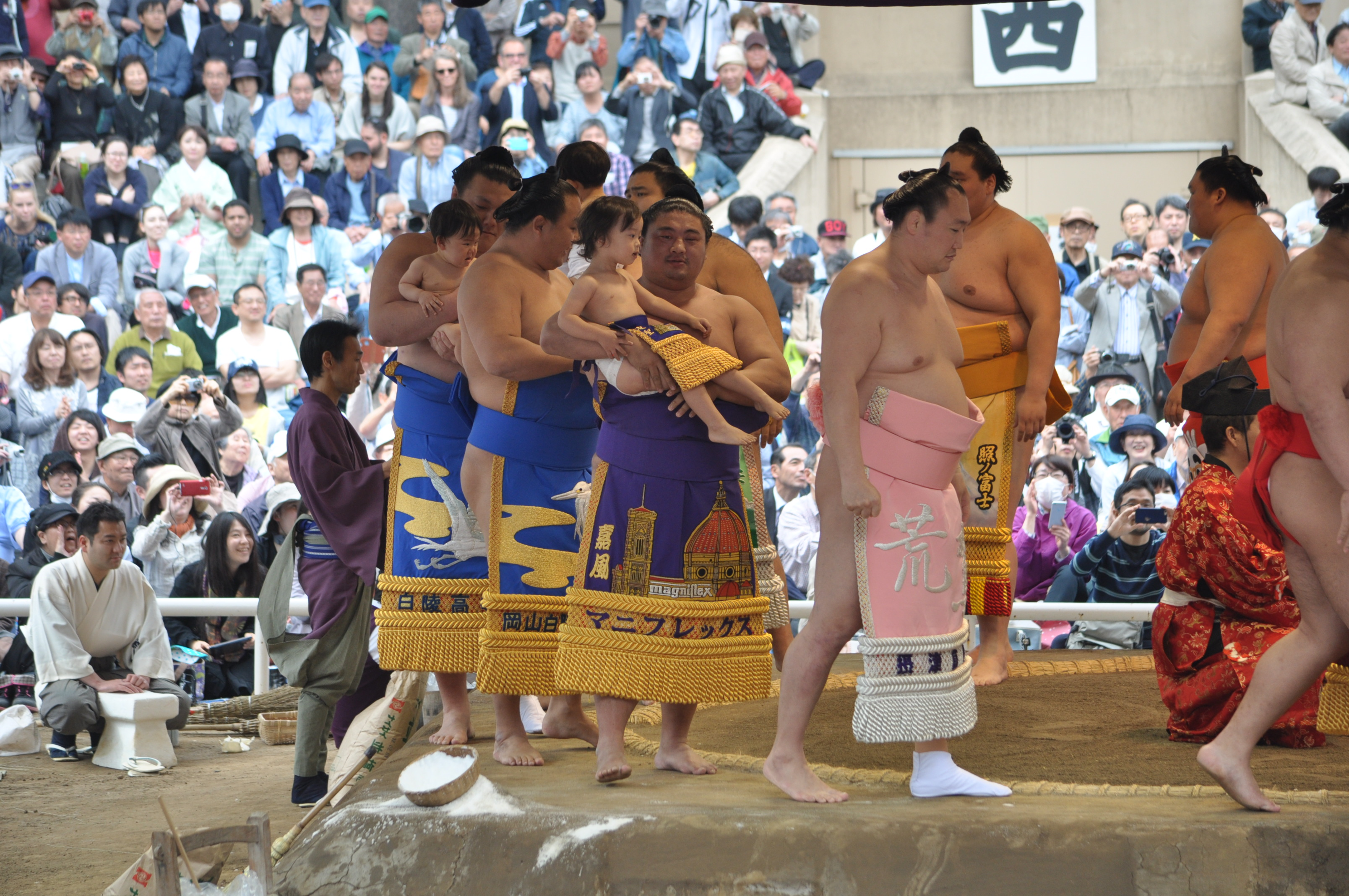 嘉風 雅継